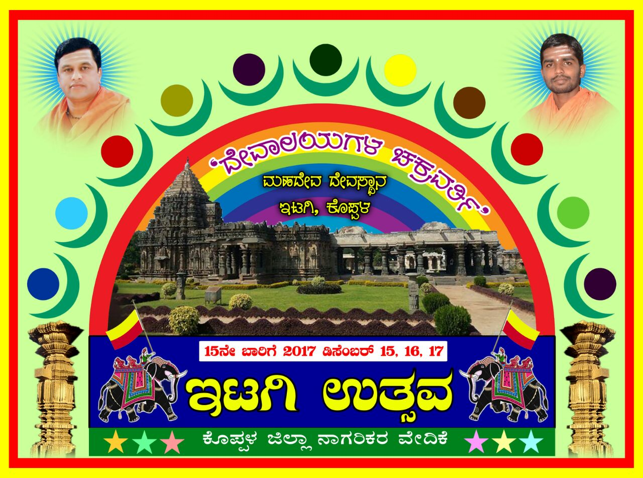 ಕನ್ನಡ: ಇಟಗಿ ಉತ್ಸವ ಕೊಪ್ಪಳ